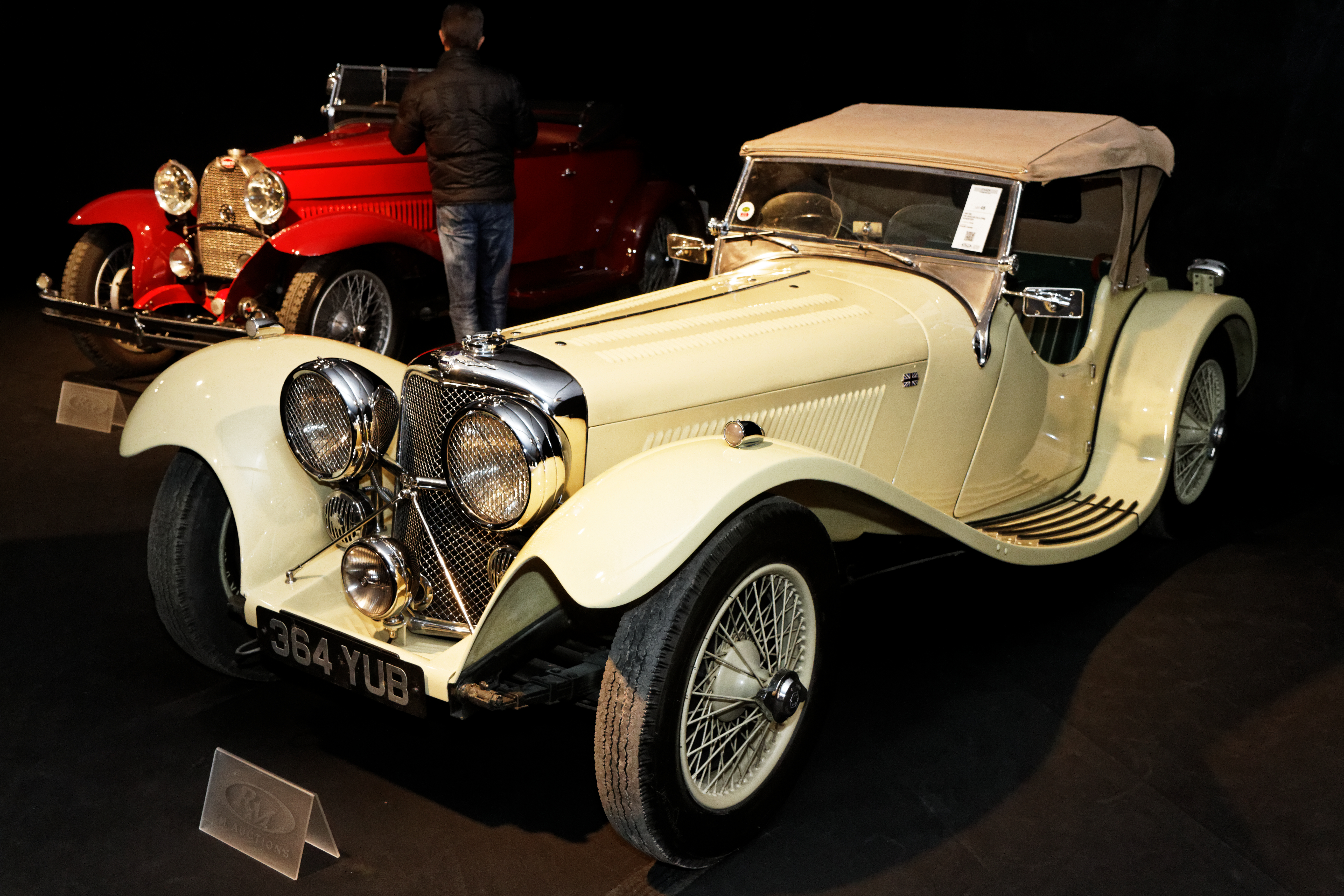 Une Jaguar SS100 2½-Litre Roadster de 1937.